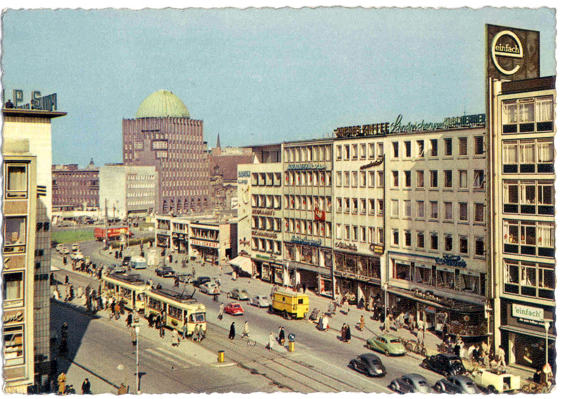 Hannover Georgstraße/Steintor, Postkarte 1960er Jahre